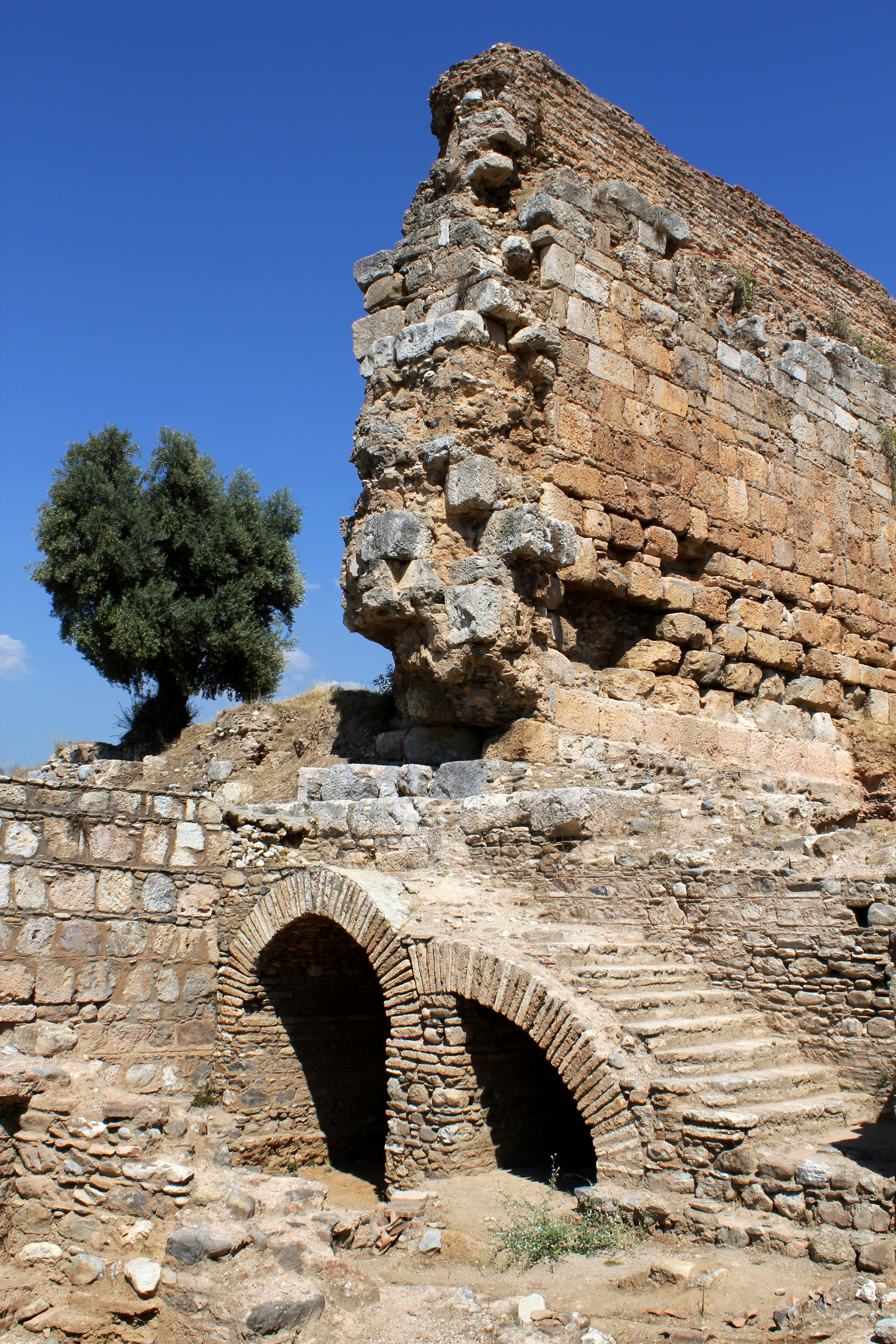 Teil eines Gymnasiumskomplexes in Tralles bei Aydın, Westtürkei